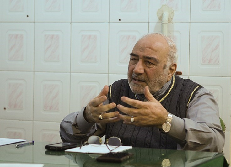 جواد منصوری